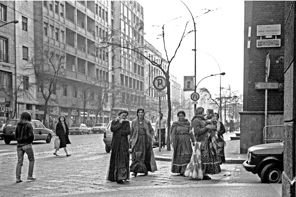 Milano, corso di Porta Vittoria, zingare (?)